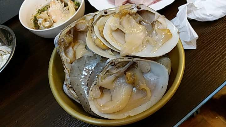 街市已宰好的貴妃蚌。